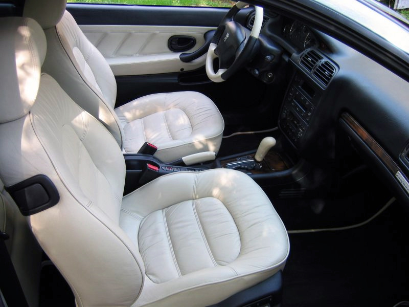 Intérieur cuir blanc Settanta de la Peugeot 406 Coupé.